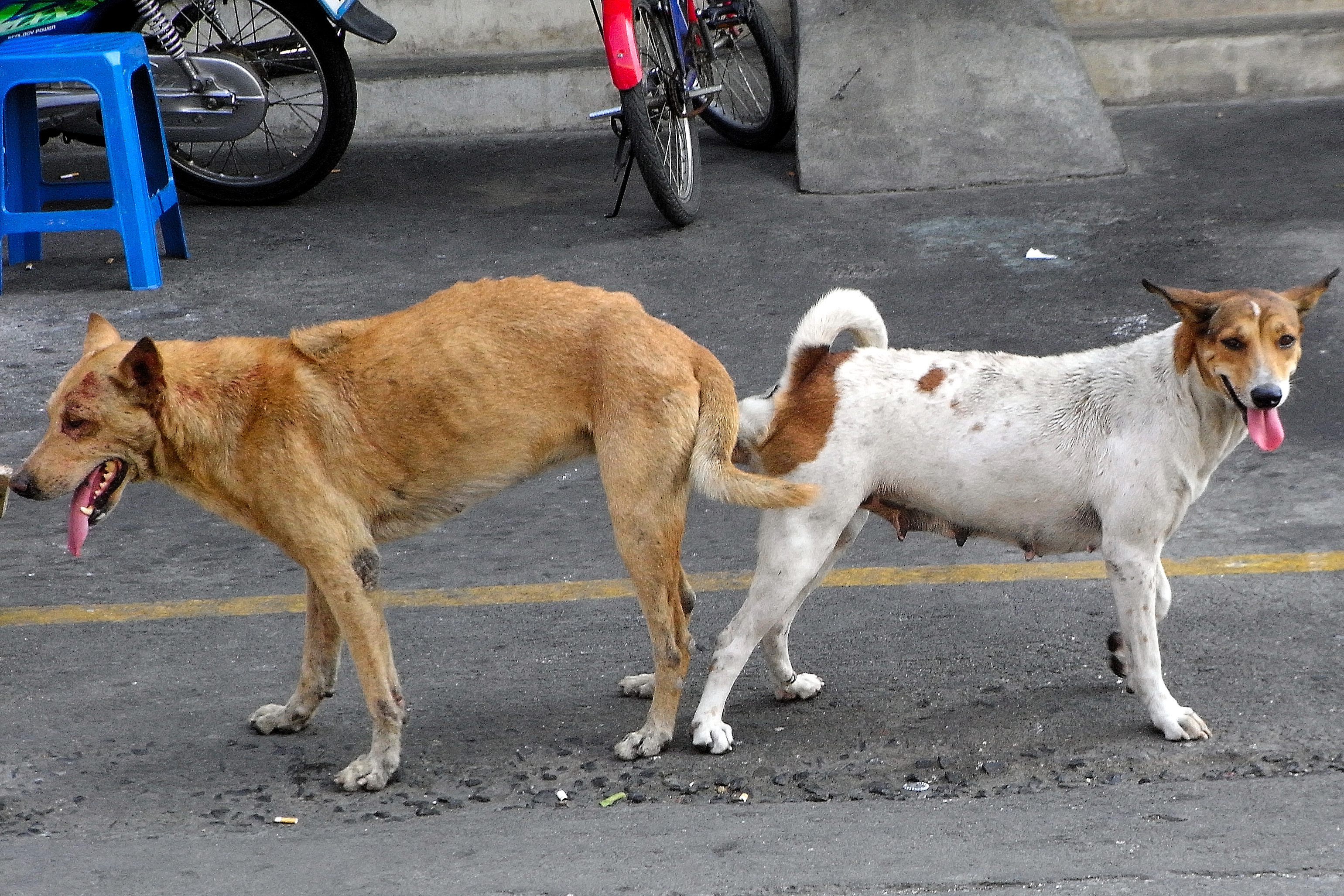 Dec 2, 2007 at 14:06, Bangkok/Thailand